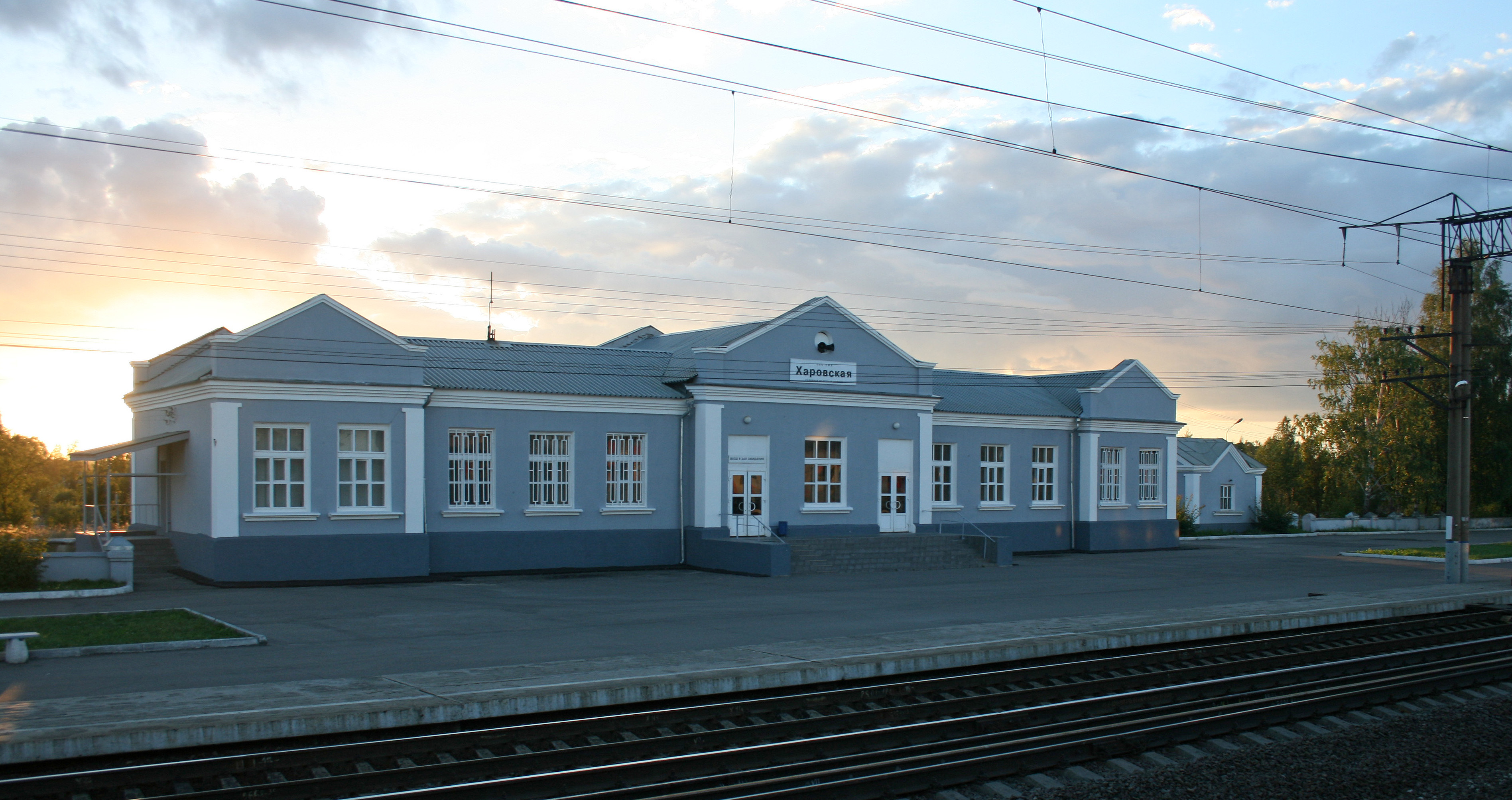 Железнодорожная станция «Харовская». Город Харовск. Вологодская область.